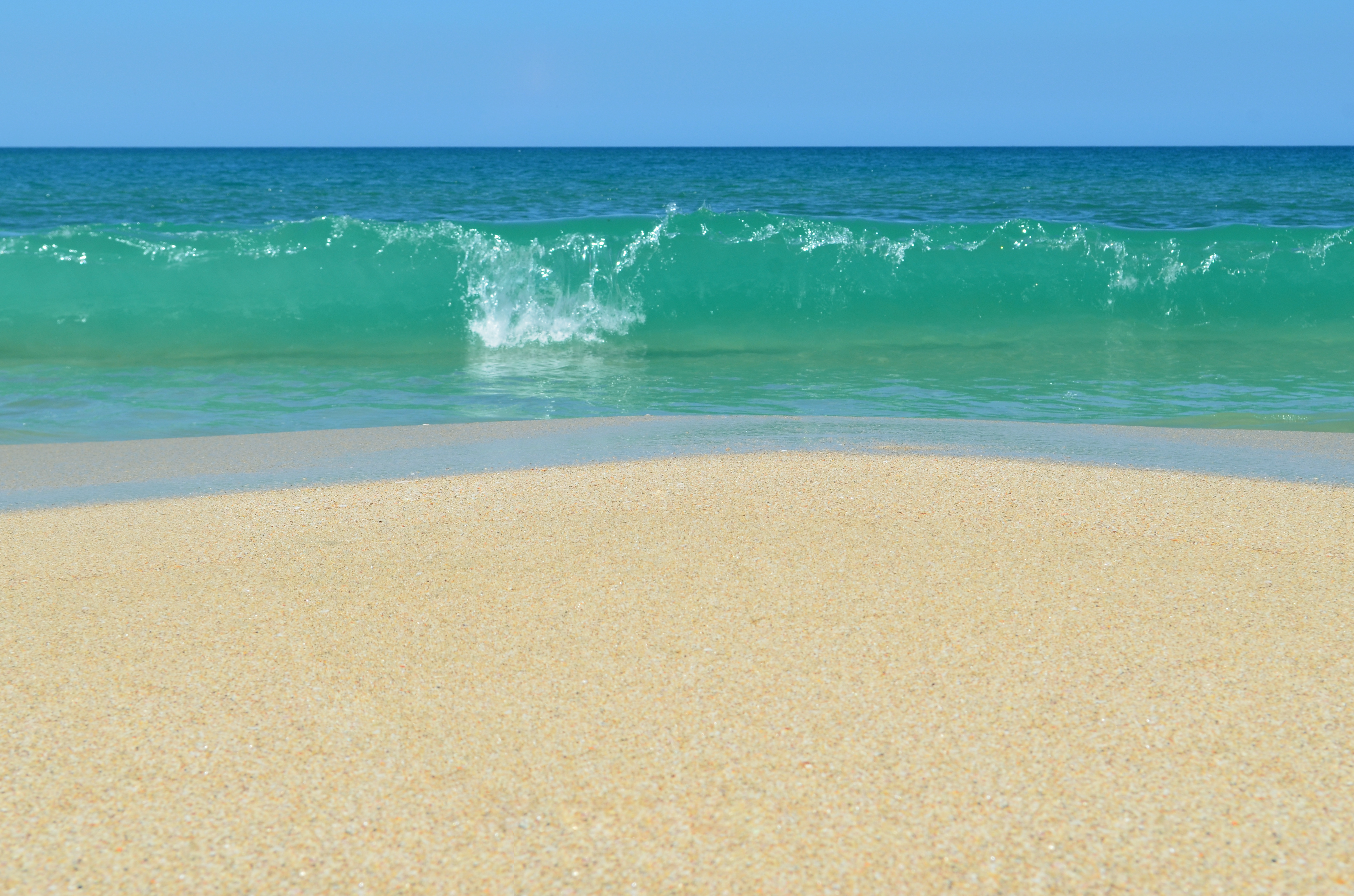 Playa Pedro González - Margarita Edo. Nueva Esparta